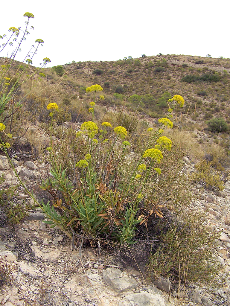 Bupleurum gibraltarium (Crujía, Cuchilleja) - Vista general en flor - Senda del Puch, circa Paso de las Yegüas, Monte del San Cayetano, Albatera (Alicante, España).